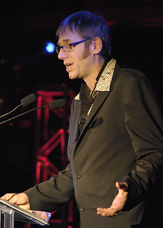 Richard Underhill